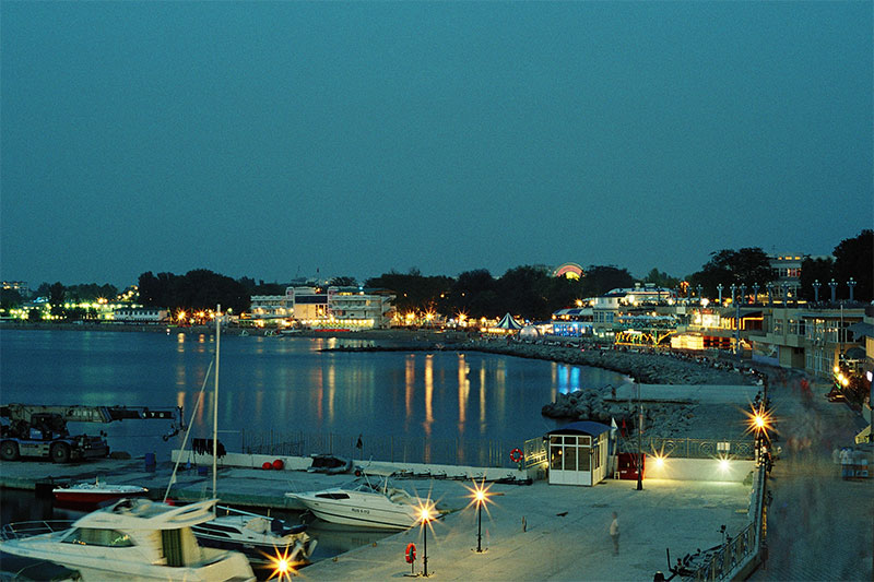 Anapa's harbor